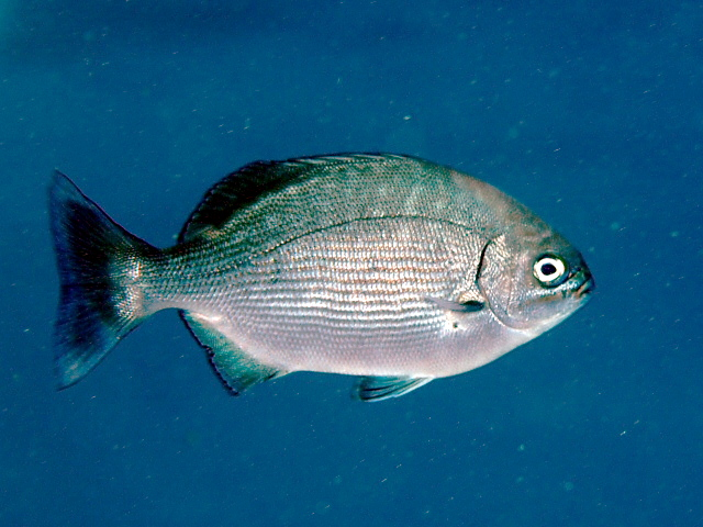 イスズミ Kyphosus vaigiensis